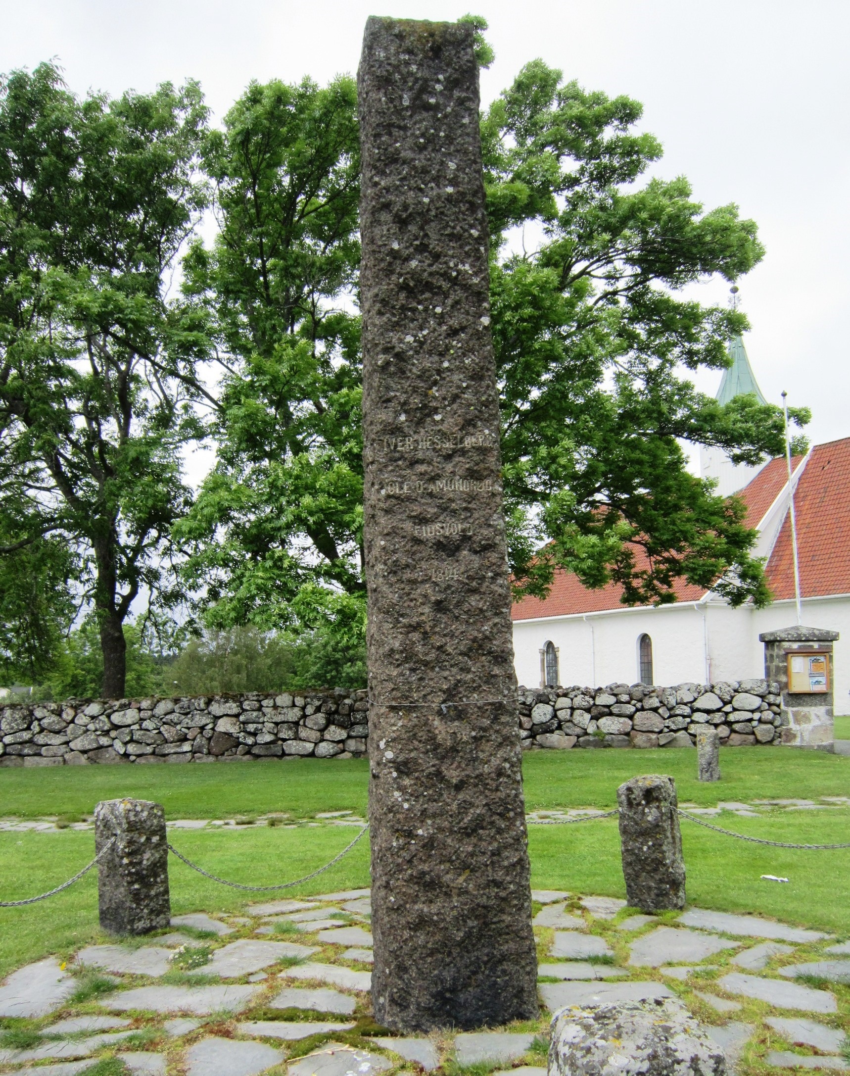 Minnebauta over eidsvollsmennene Iver Hesselberg og Ole Olsen Amundrød ved Tjølling kirke